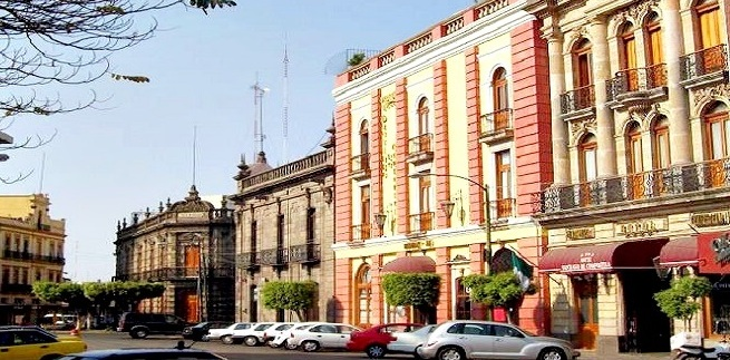 Clima Gdl 1 nov 2013 - Calle 8 de Julio